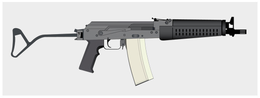 Wieger STG 943 (DDR) // Selbst erstellte Vectorgrafik. Dieses Bild ist eine jpg-Kopie von der Vectorgrafik. Nutzungsrechte sind freigegeben. bei Fragen: Vgl. [1] --Crux 17:23, 11. Feb 2006 (CET)